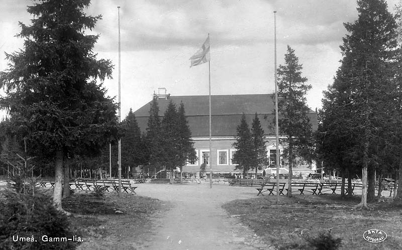 Sävargården, Gammlia.; Bruksherrgård; Byggnadsverk; Slott och herrgårdar